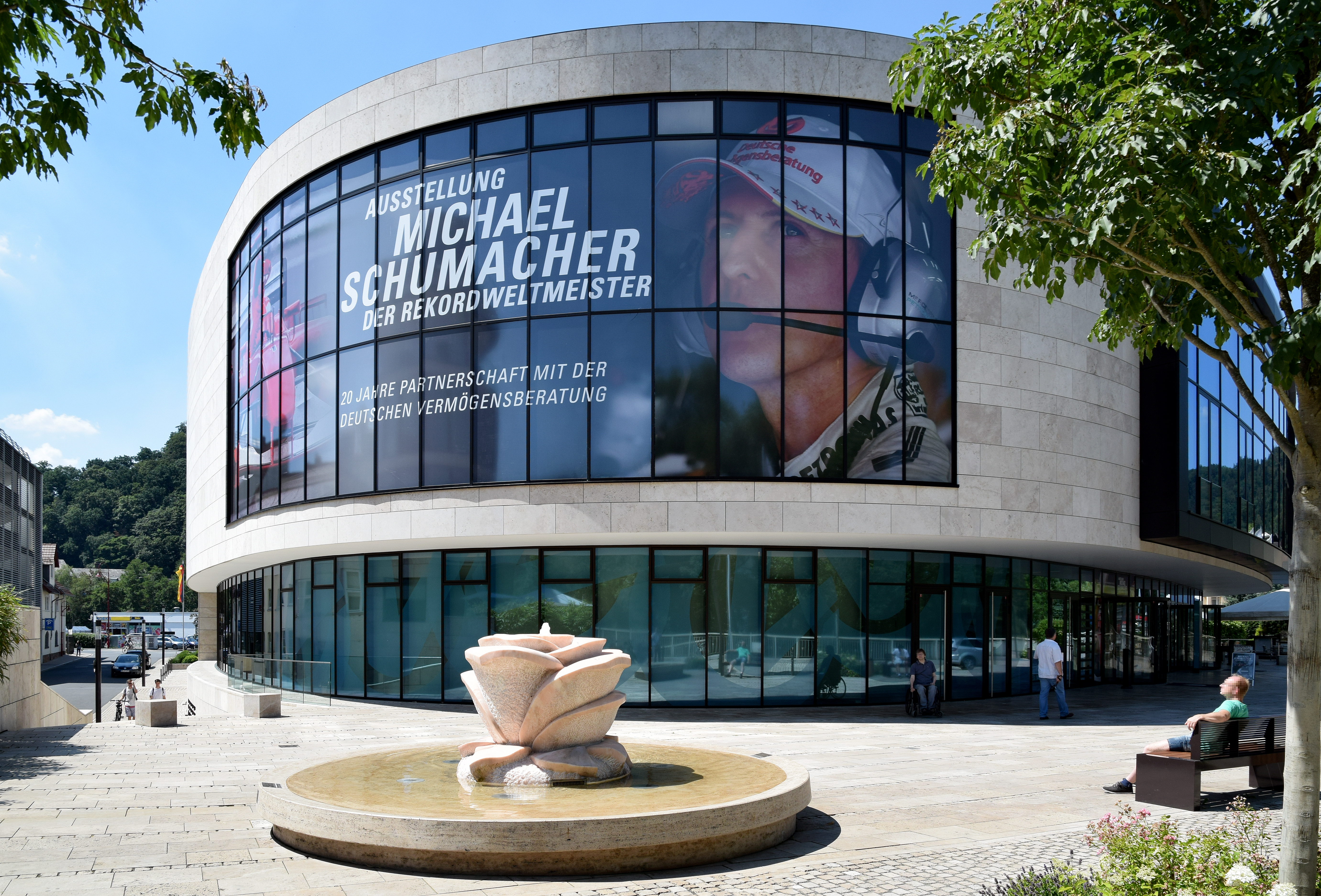 Deutsche Vermögensberatung und Rosenbrunnen in Marburg, Michael-Schumacher-Ausstellung